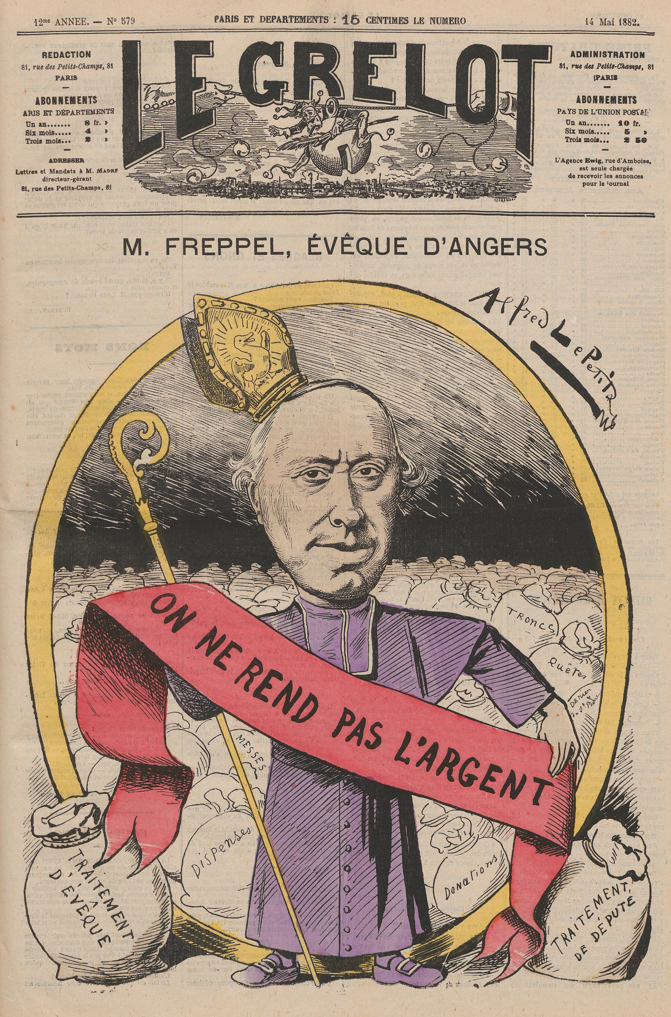 Caricature de Mgr Freppel critiquant le cumul de son traitement de député avec celui d'évêque.